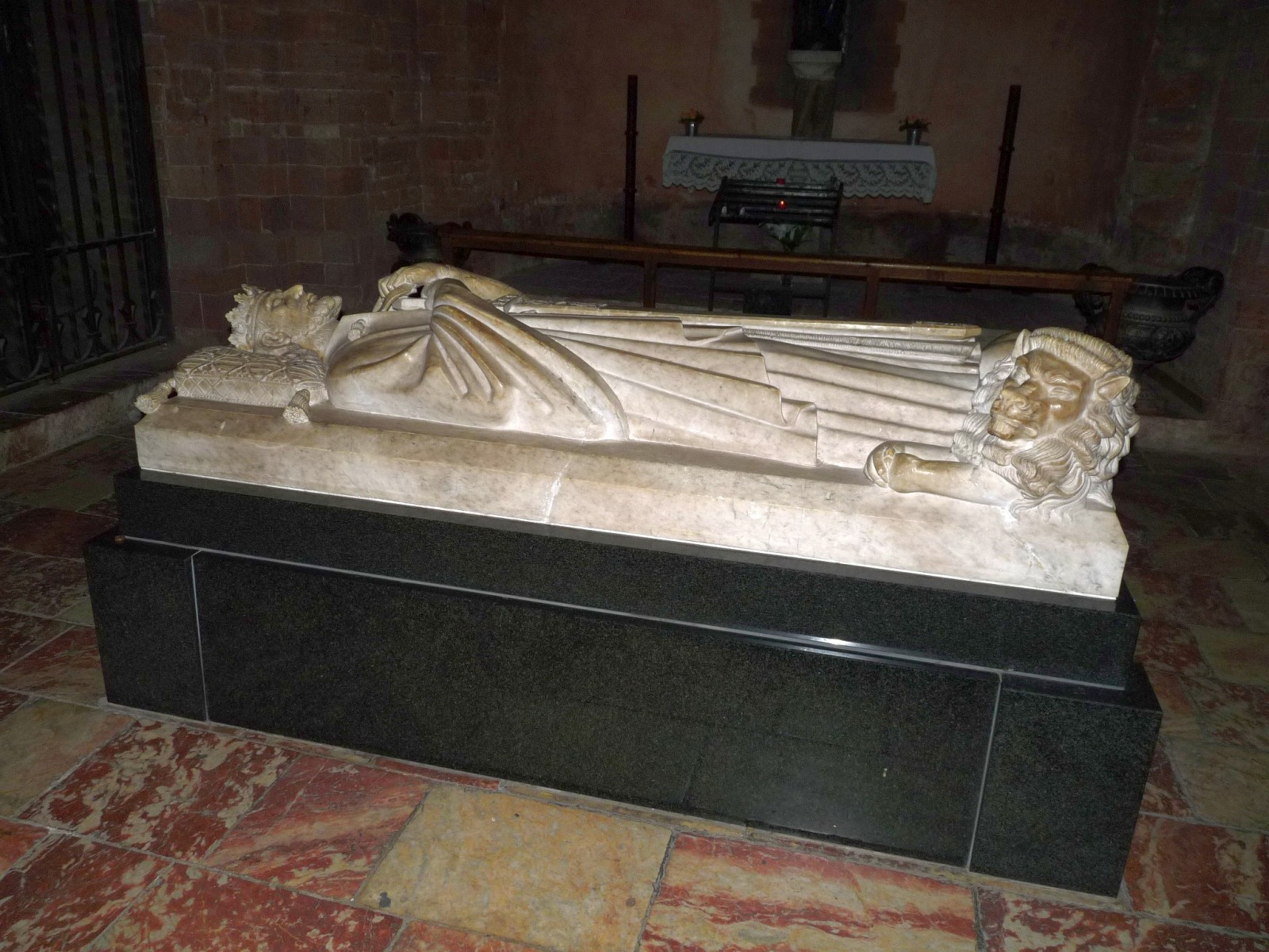 Gisant du roi de Majorque, cathédrale de Perpignan, Pyrénées-Orientales, France